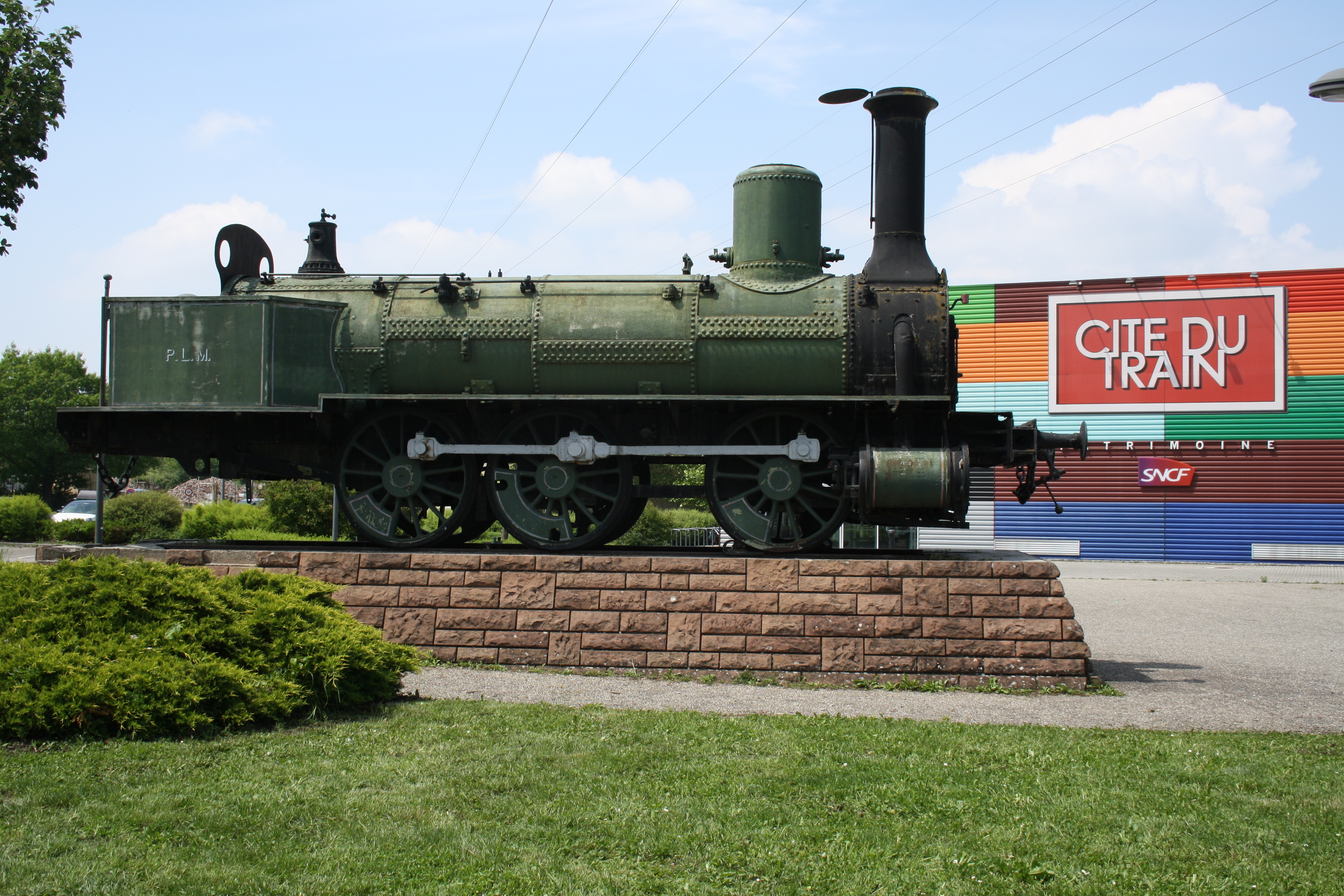 Vorplatz des Eisenbahnmuseums Cité du Train mit Dampflokomotive der P.L.M.